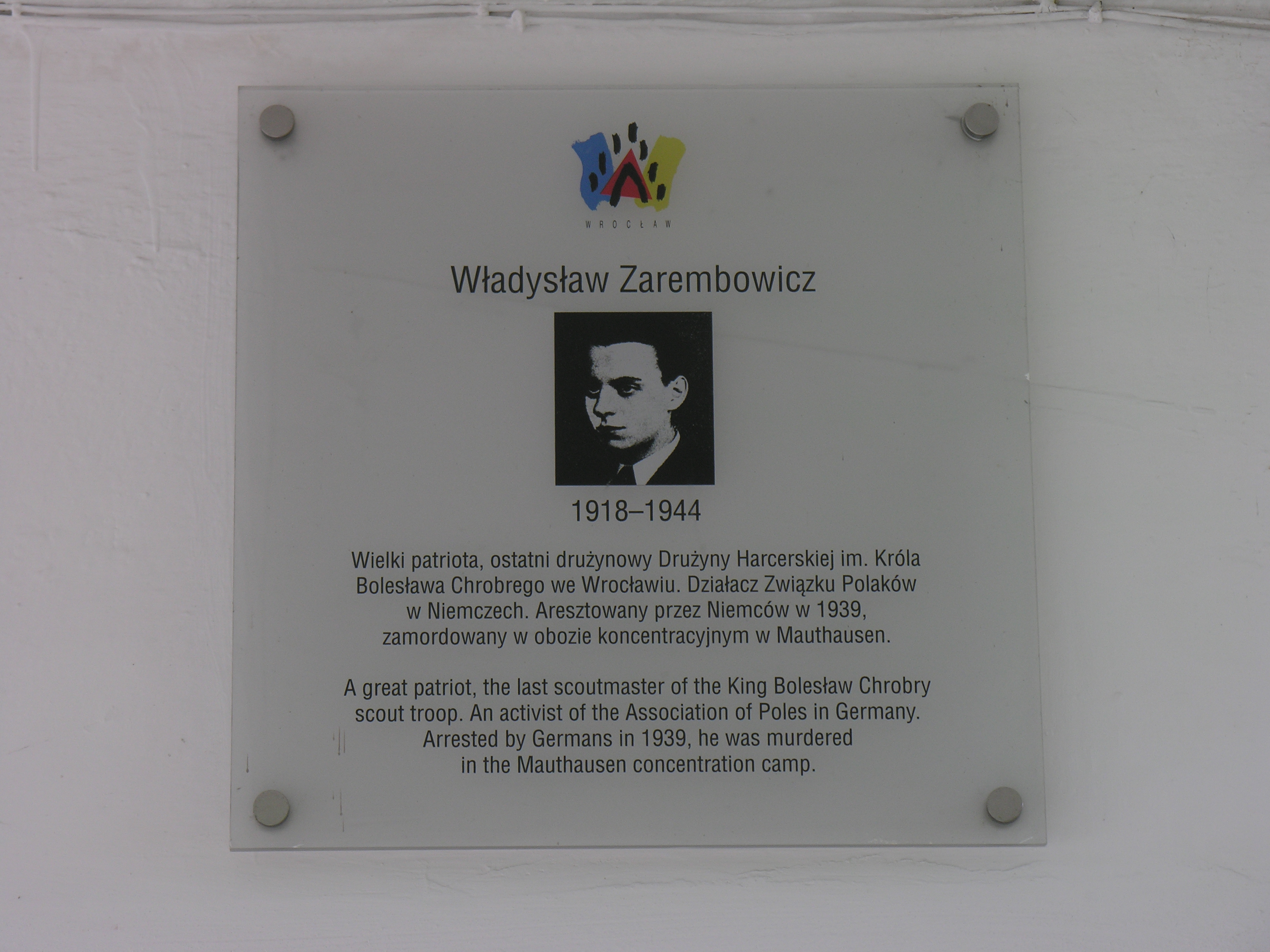 Tablica ku czci Władysława Zarembowicza, Wrocław, SP nr 72, ul. Trwała 17/19